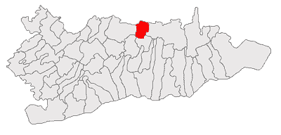 Categorie:Hărţi ale judeţului Călăraşi